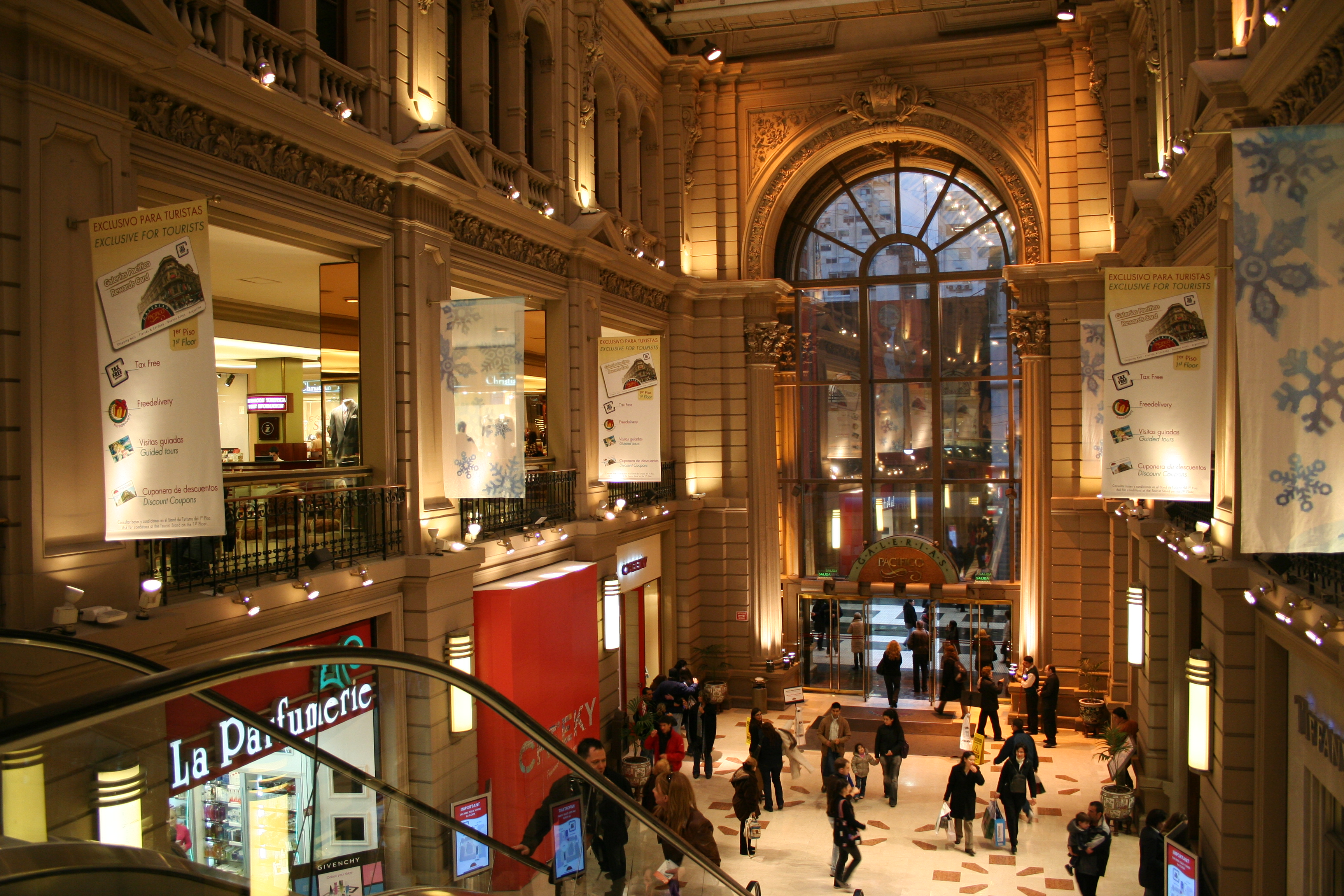 Galerías Pacífico, calle Florida y Córdoba, Buenos Aires, Argentina.